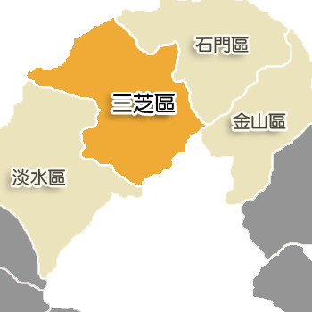 三芝區相對位置。